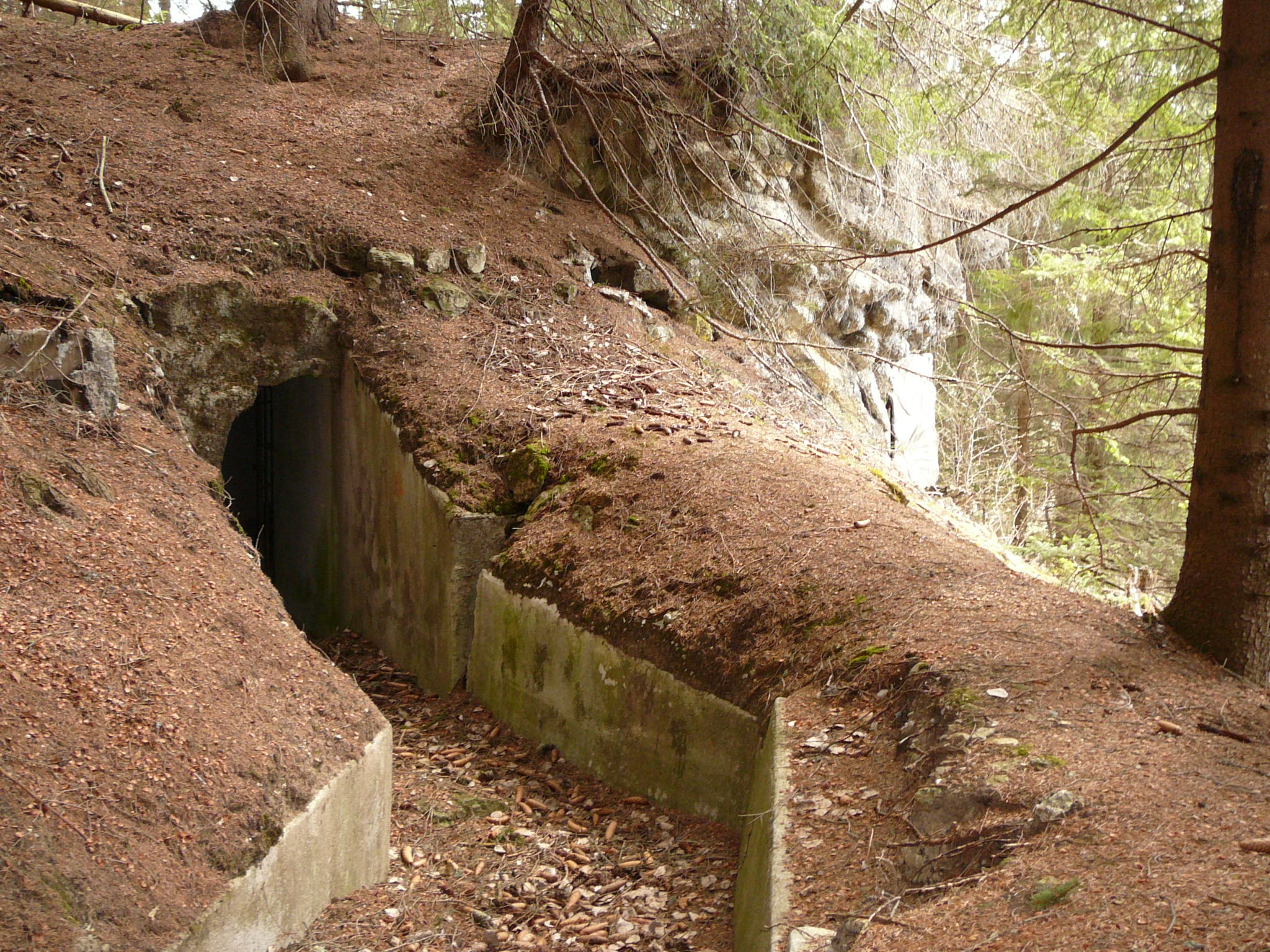 opera 6, sbarr drava